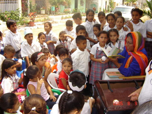 Llevando los libros a la comunidad, como incentivo para el uso de la biblioteca Autor: Zumar-Alfredobi Lugar: Bastión Popular - Guayaquil Fecha: Lujio 2005)